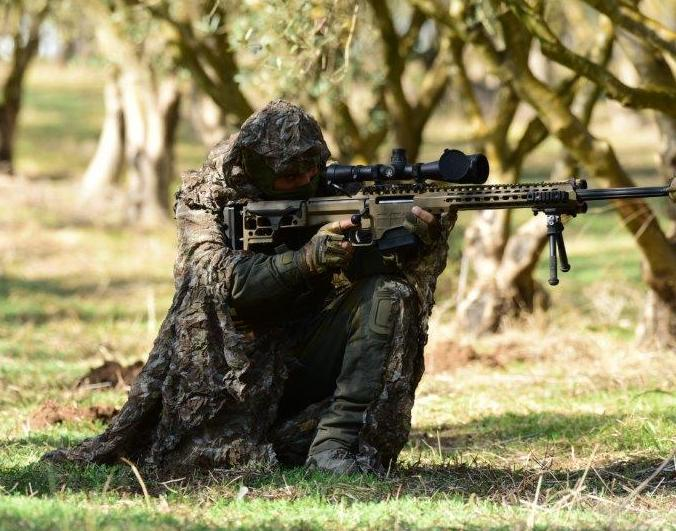 תרגיל מערך העומק והמיוחדים באי כרתים שביוון. Depicted place: Crete